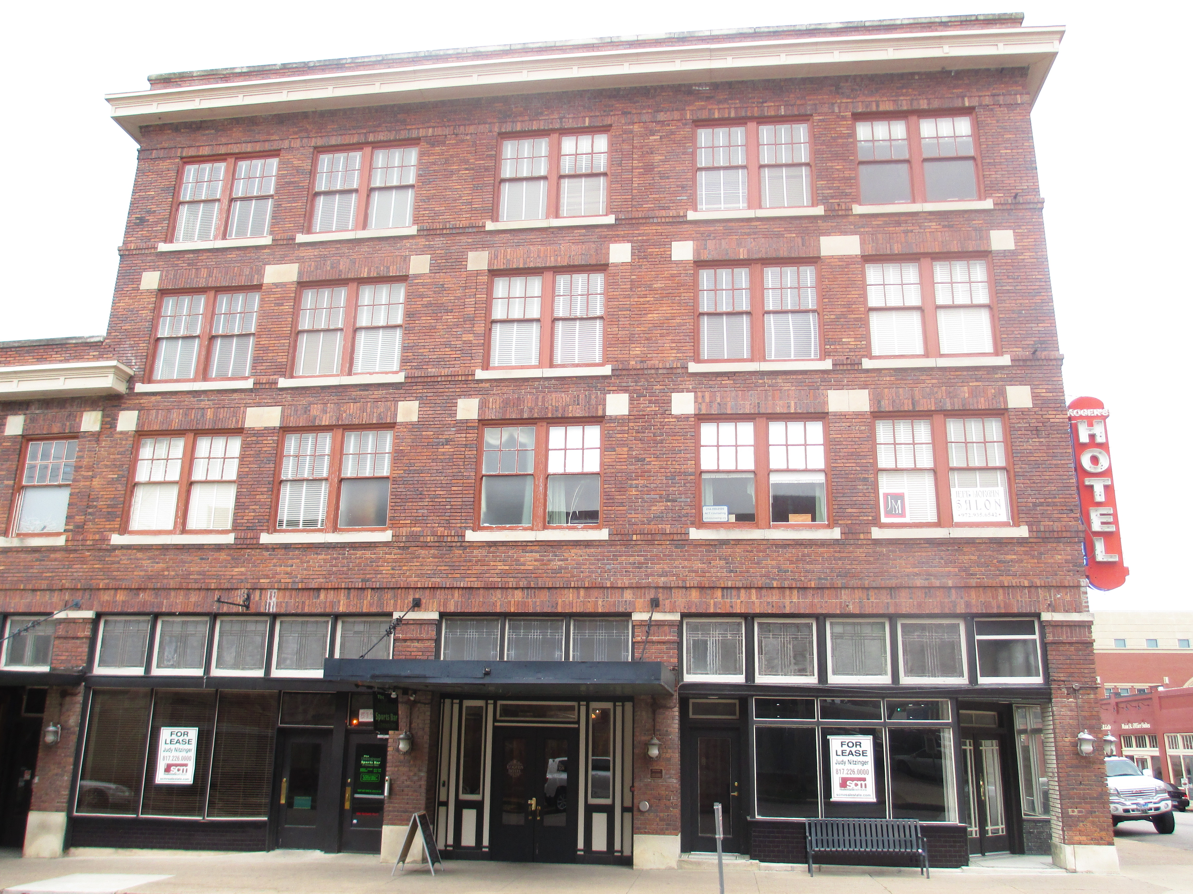 Rogers Hotel, Waxahachie, TX